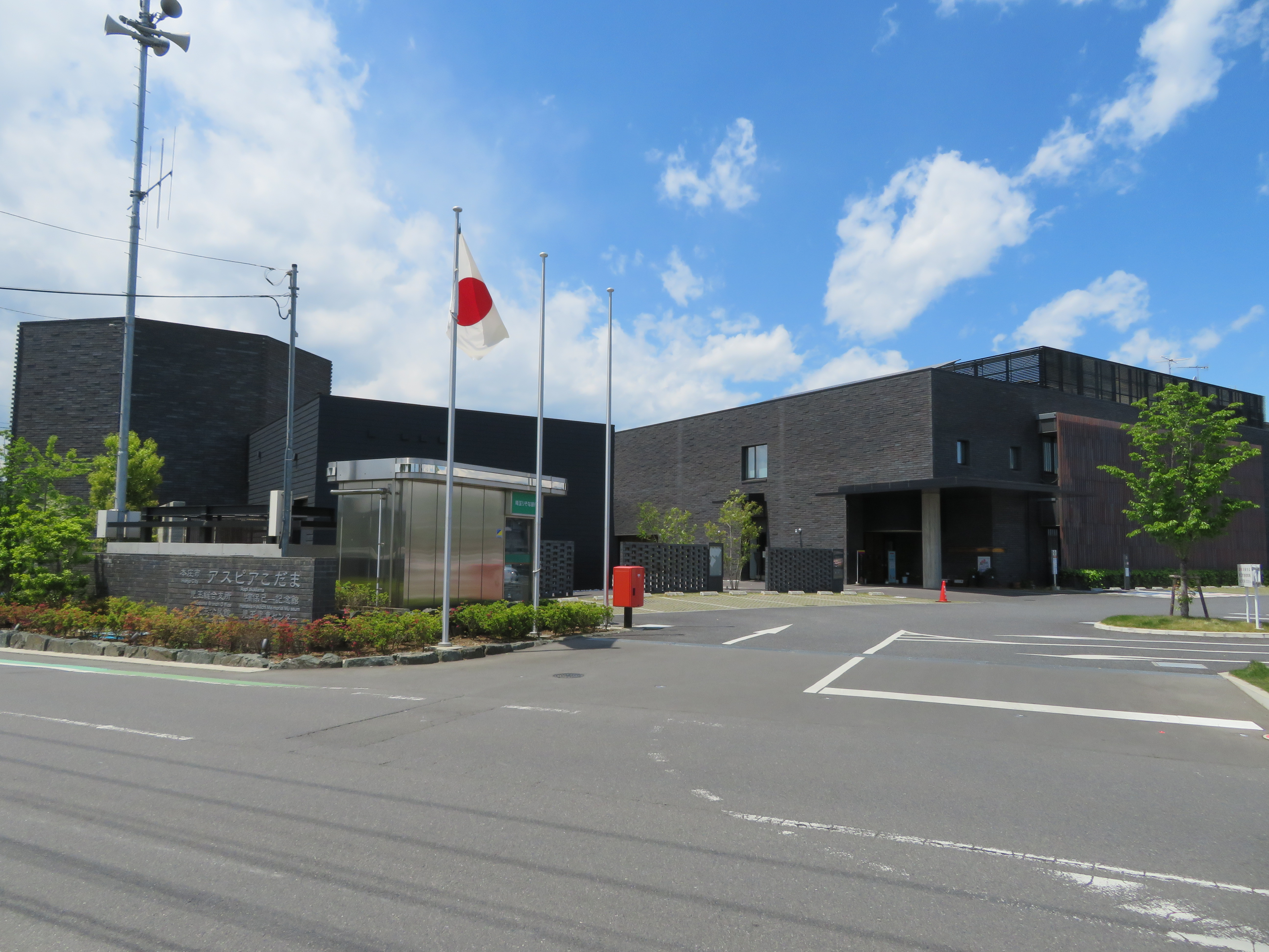 埼玉県本庄市児玉町にあるアスピア児玉（児玉総合支所） Canon PowerShot SX720 HS